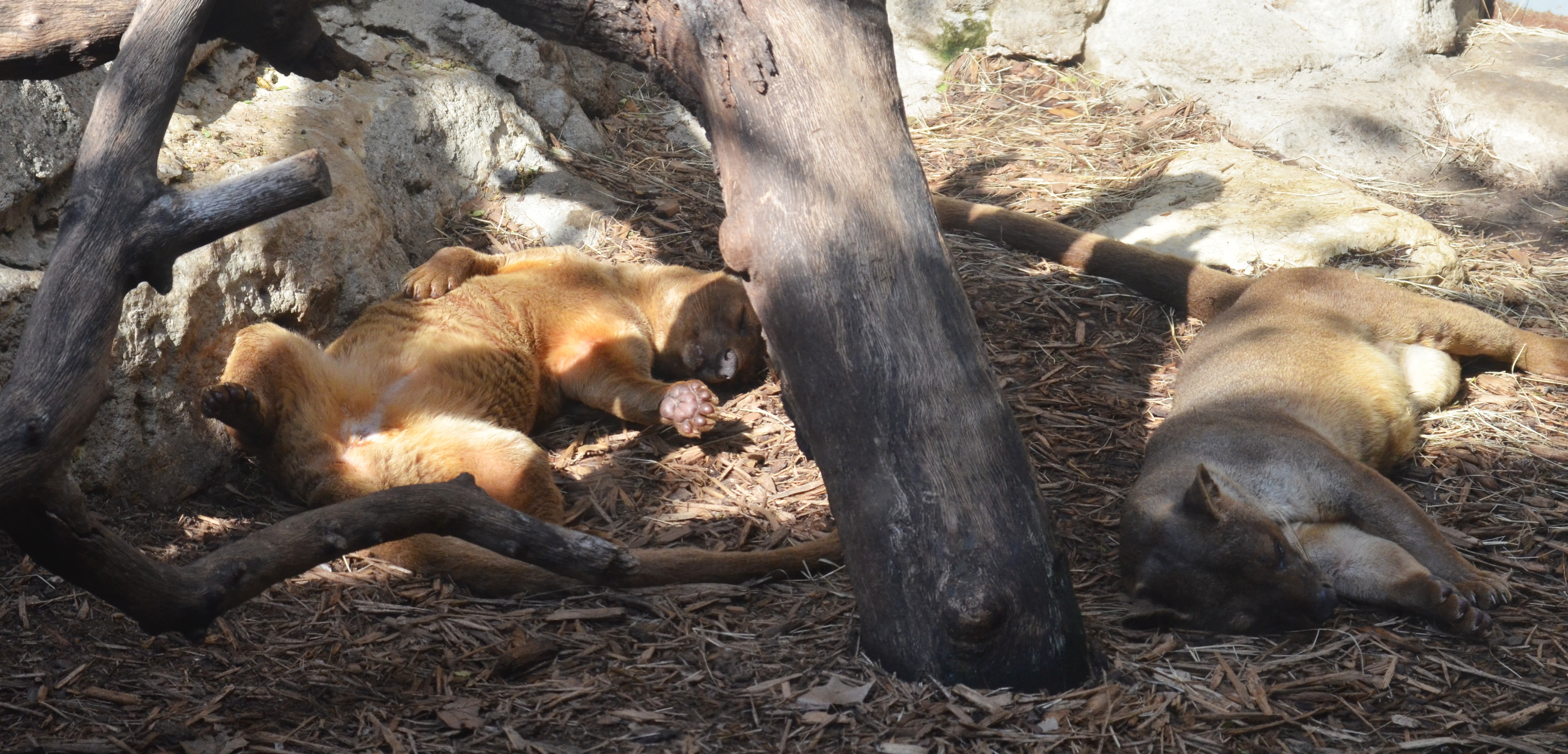 Dozing Fossa